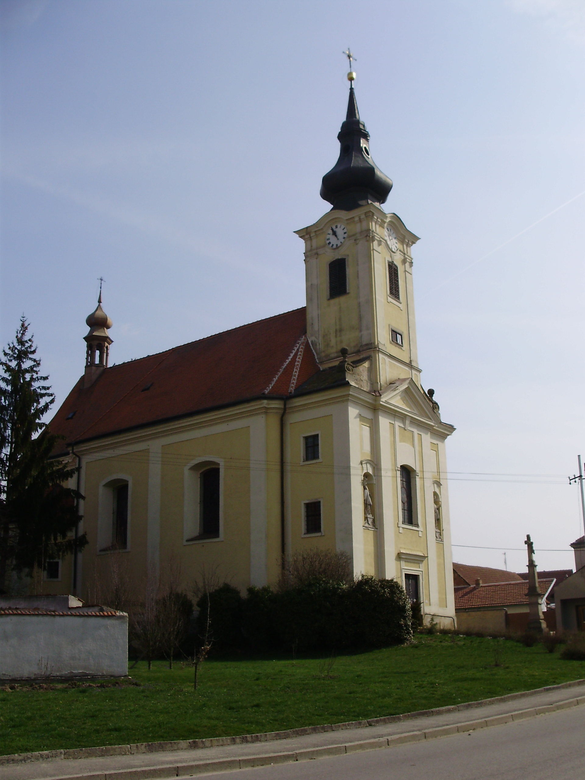 Farní kostel „Sv. Jakuba Většího a Matouše“